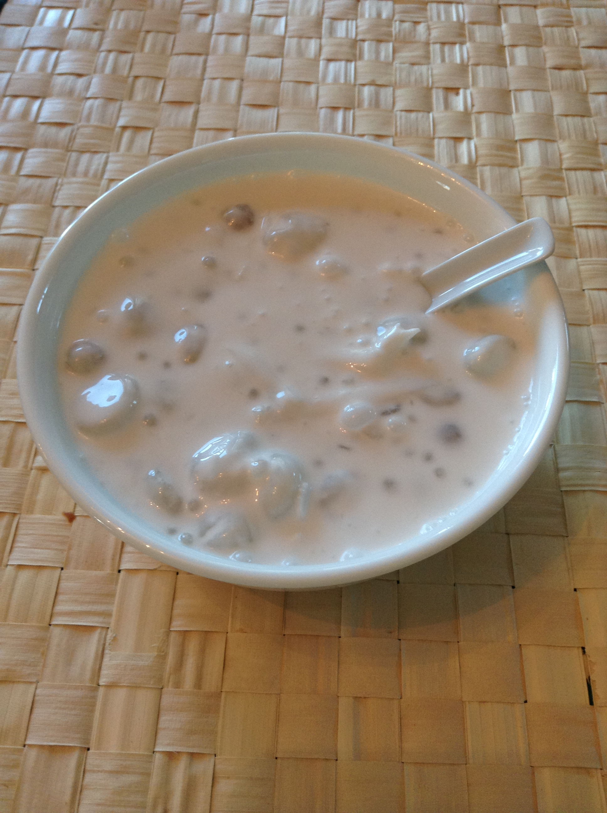 Tagalog: Ginataang bilu-bilo, pinindot